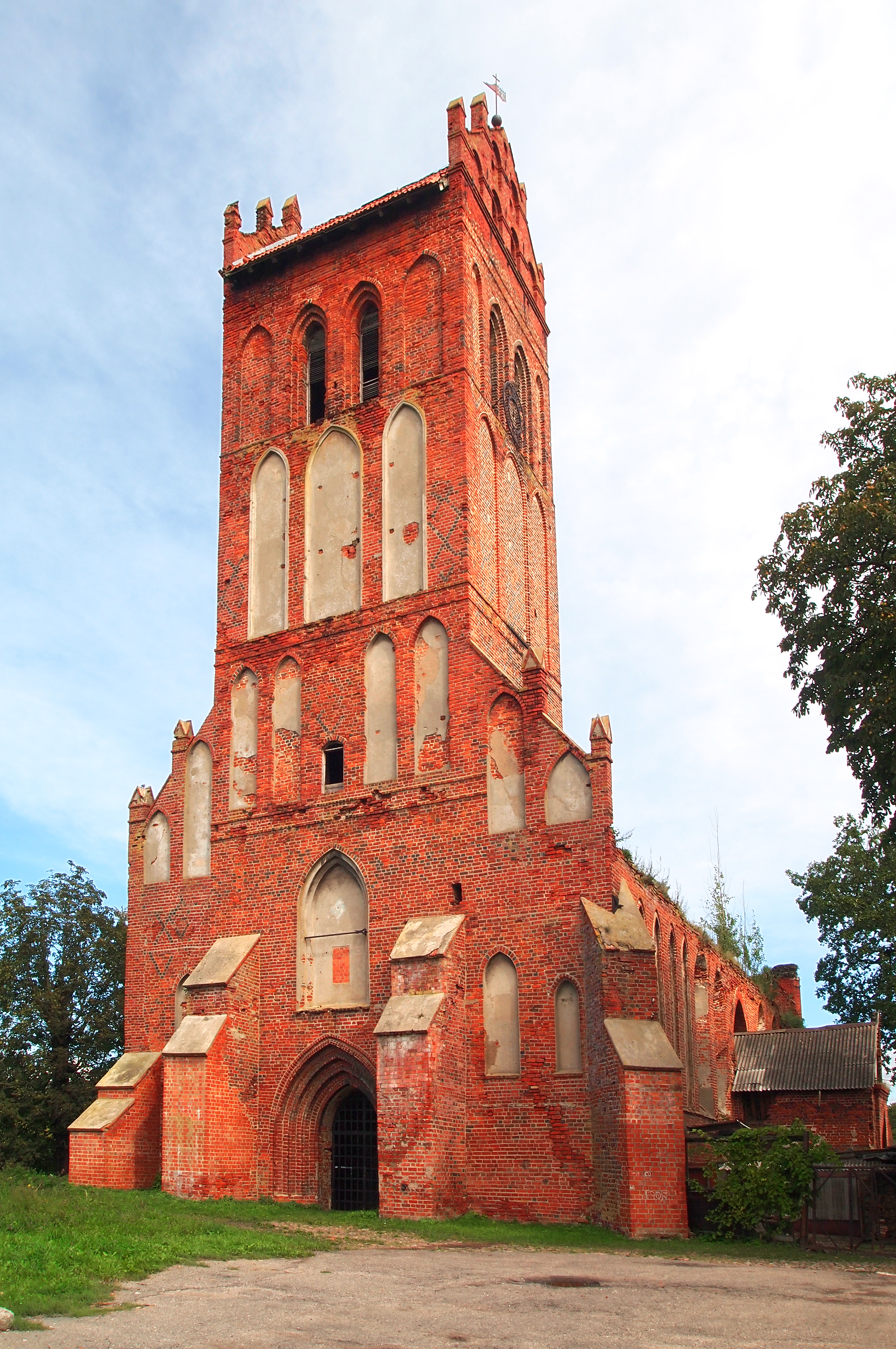 Руины кирхи: улица Первомайская, 1, Железнодорожный, Правдинский район, Калининградская область